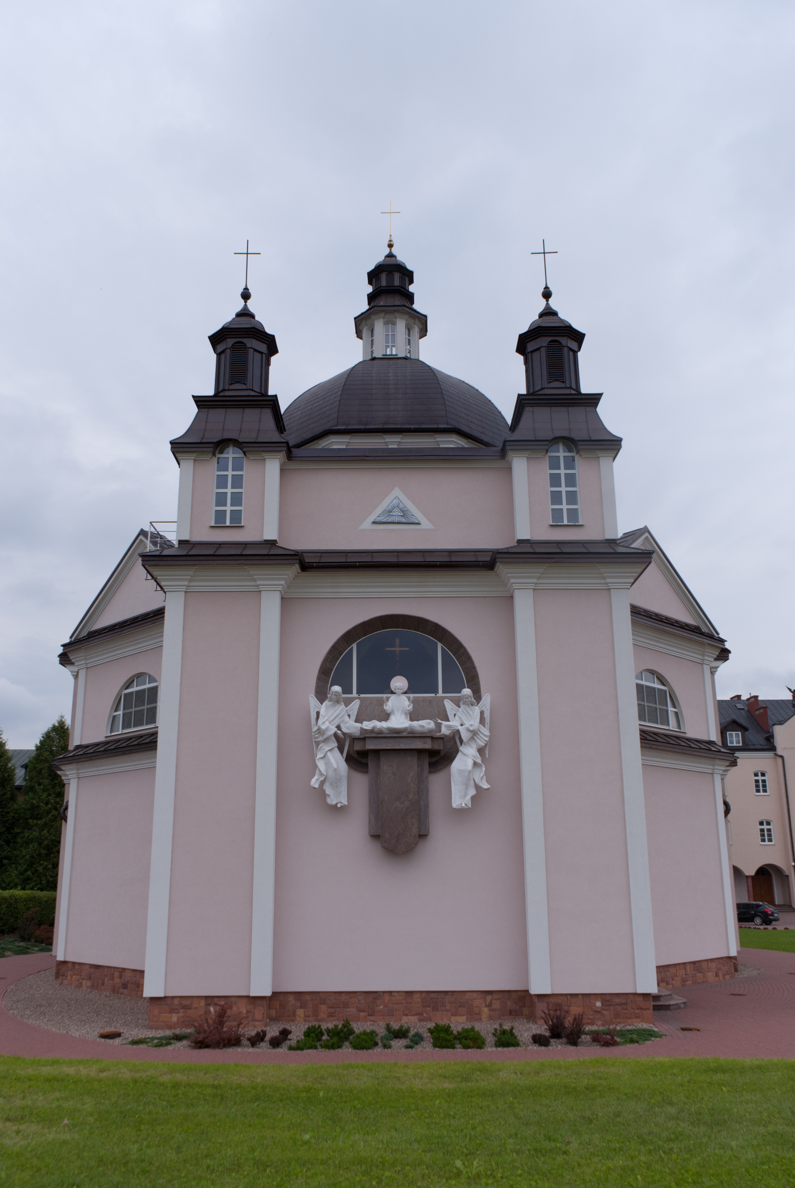 Zgromadzenie Sióstr Służebniczek Najświętszej Maryi Panny Niepokalanie Poczętej w Starej Wsi.